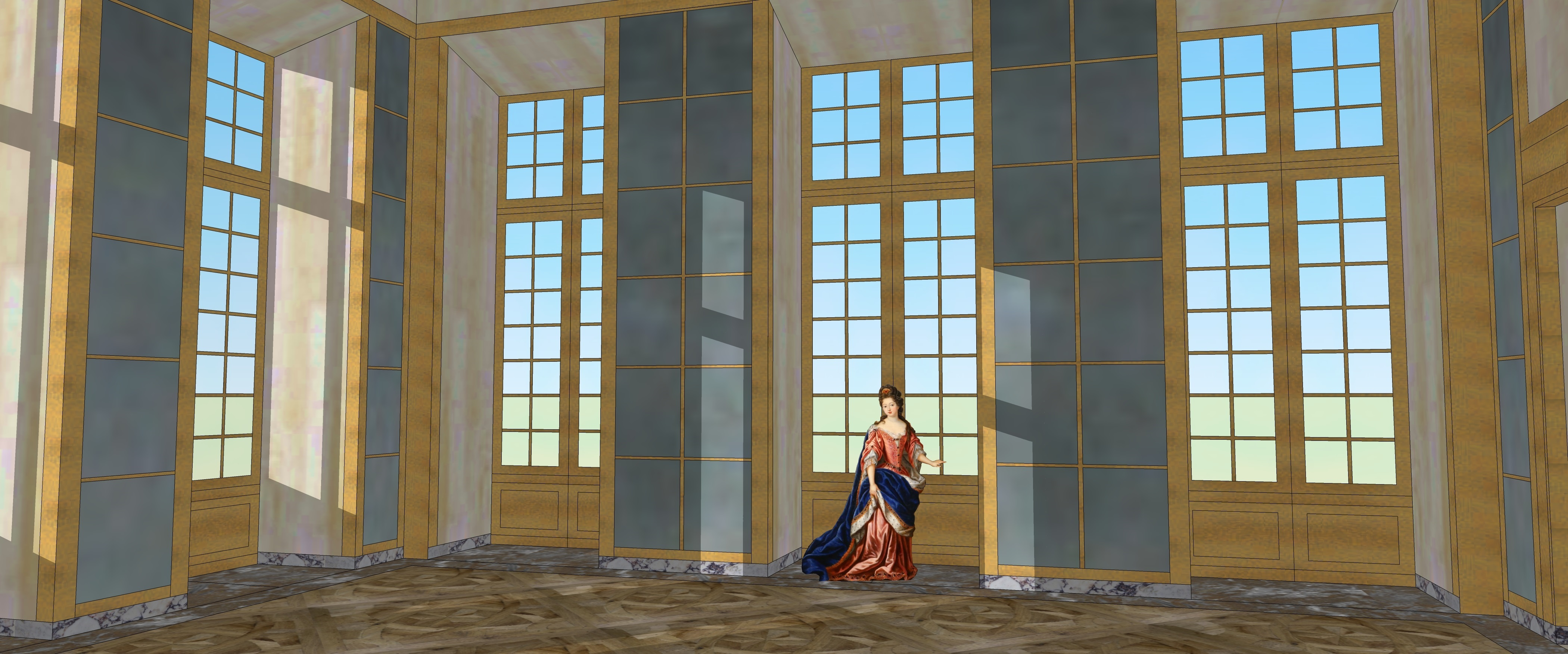 Essai de restitution du Cabinet des Glaces ou Salon du Palais-Royal, au bout du Grand Appartement de Monsieur, état vers 1692 à 1698. C'est le futur salon d'Oppenord, et la Galerie d'Enée sera édifiée en obstruant les deux fenêtres de droite.